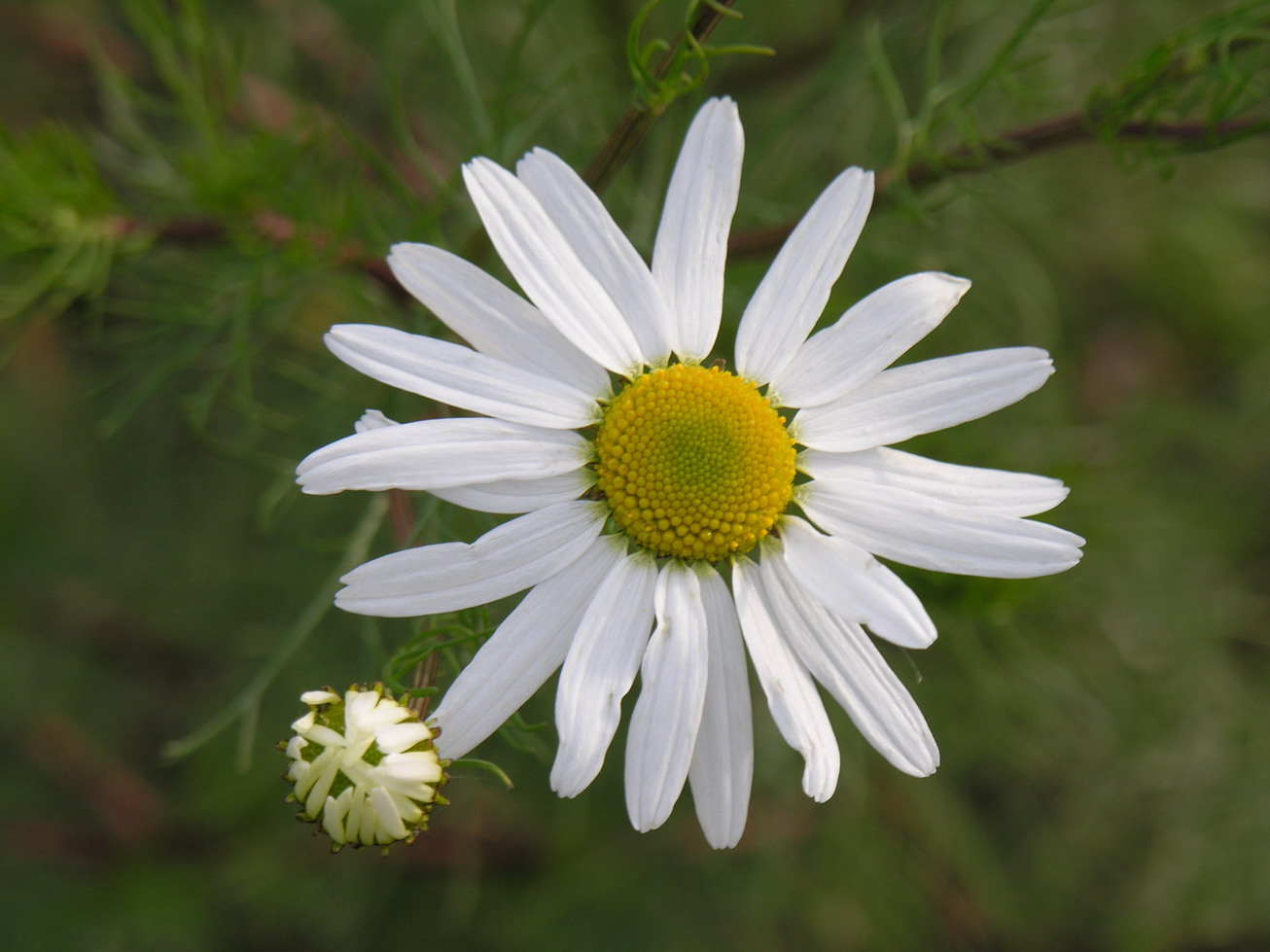 Bekvapio šunramununio (Trpleurospermum perforatum) žiedas Foto: Algirdas, 2005 m. lapkričio 5 d.